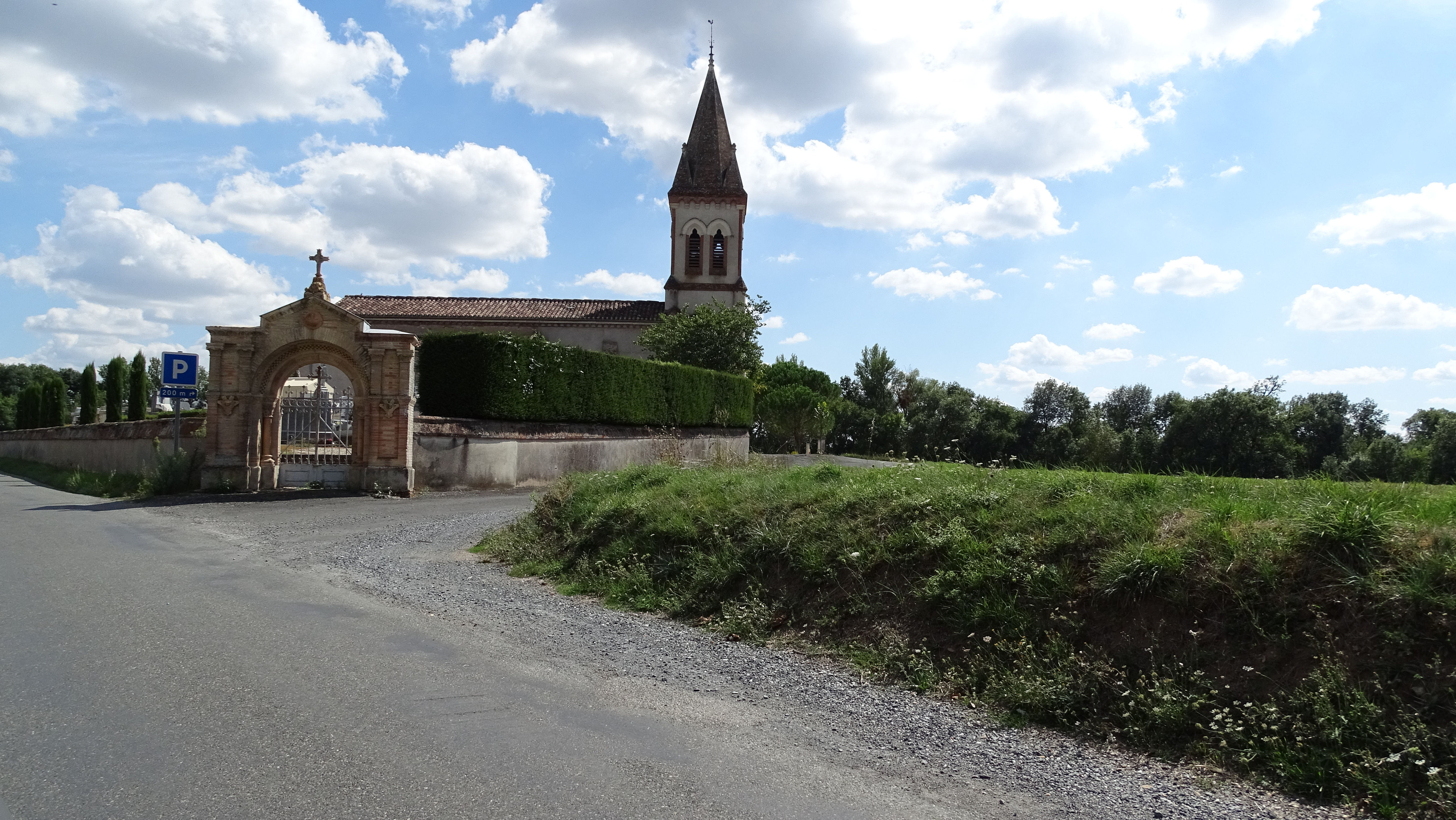 Église de Rivières dans le Tarn